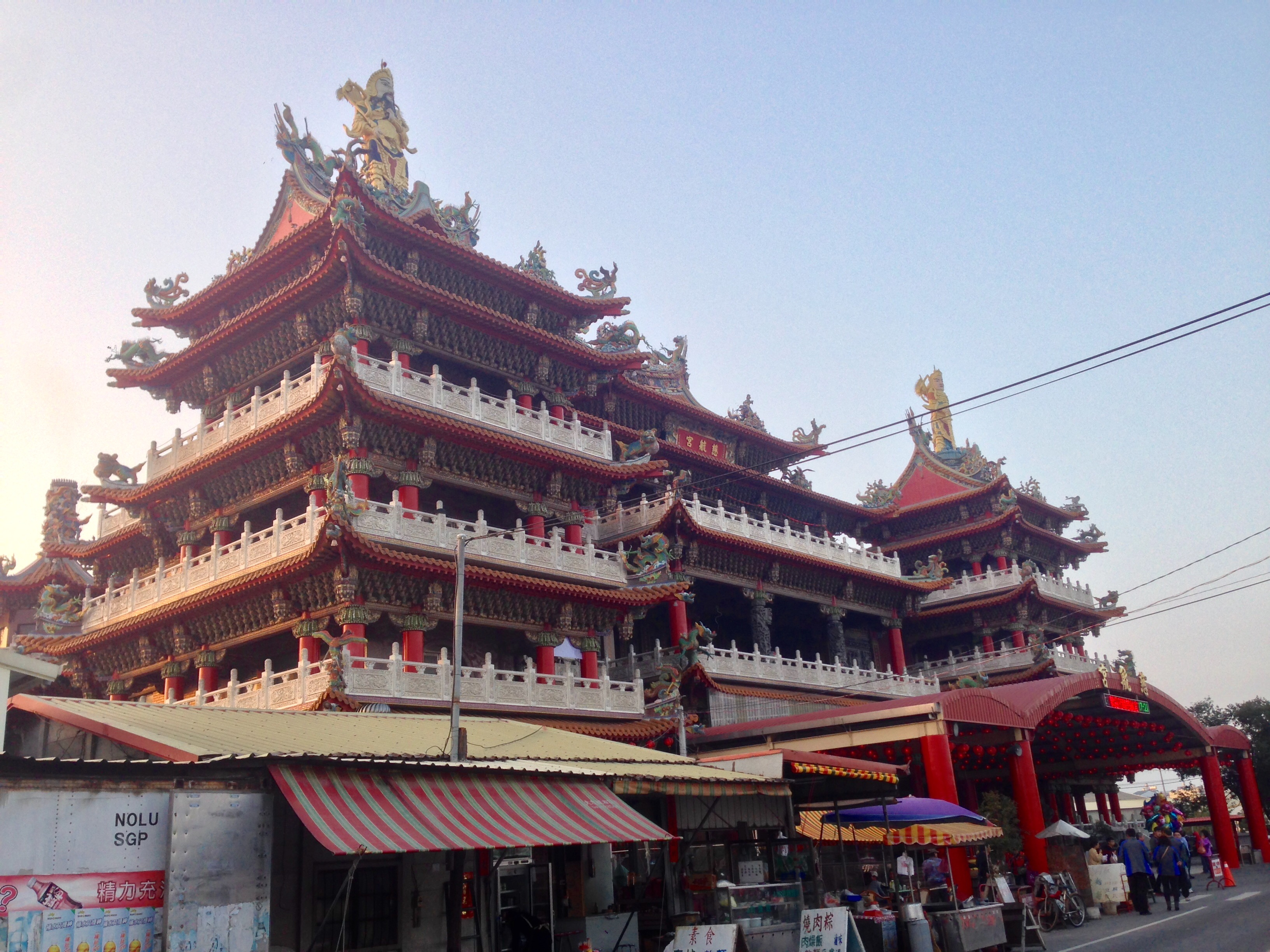 竹塘慈航宮側景